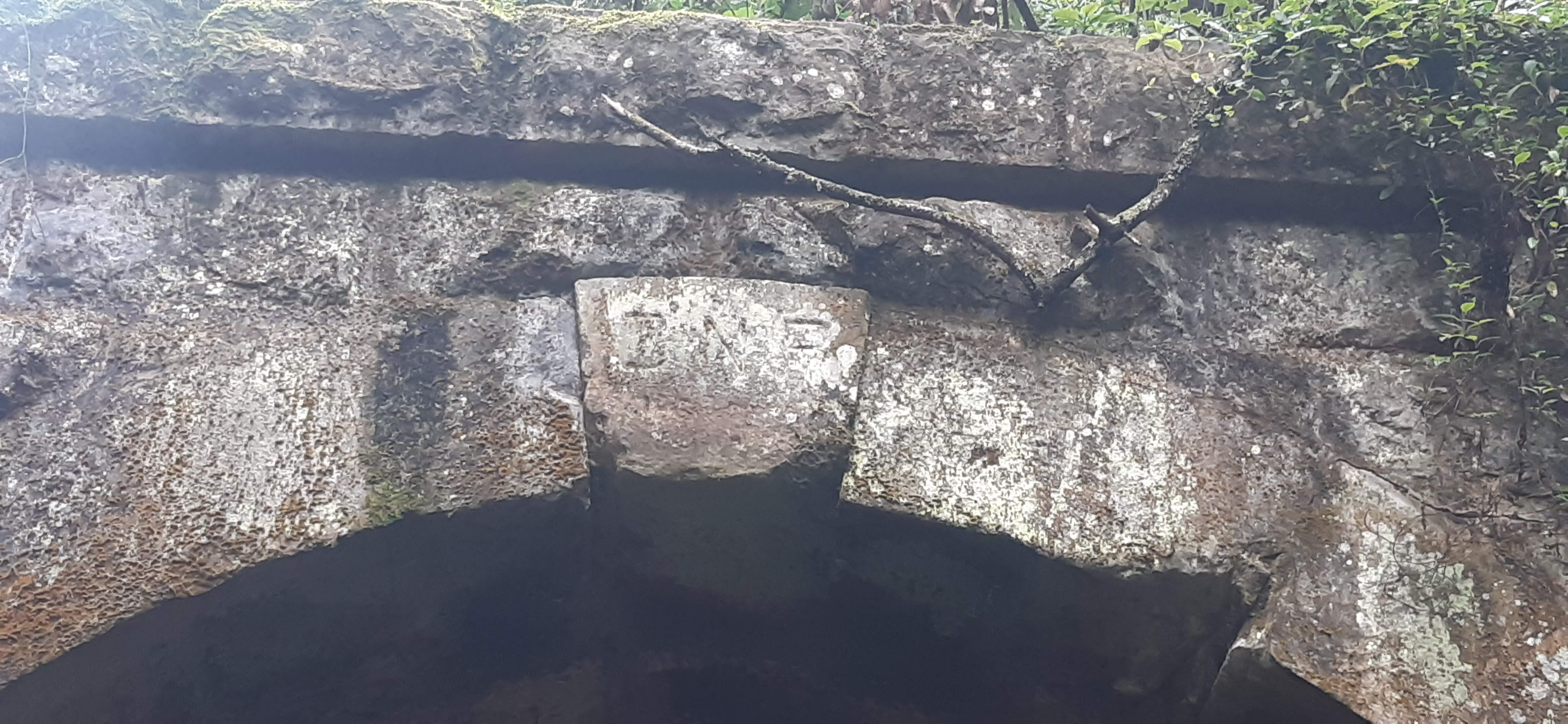 grabado de la empresa de FNC Ferrocarriles Nacionales de Colombia año de 1908